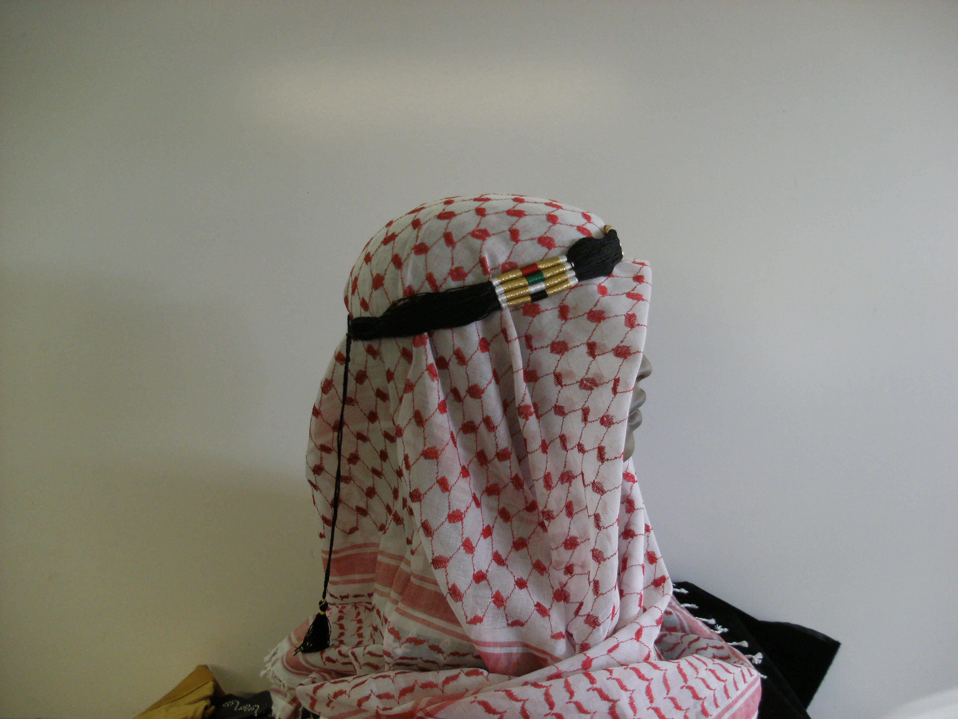 habillement modeste pour des musulmans et des non-musulmans